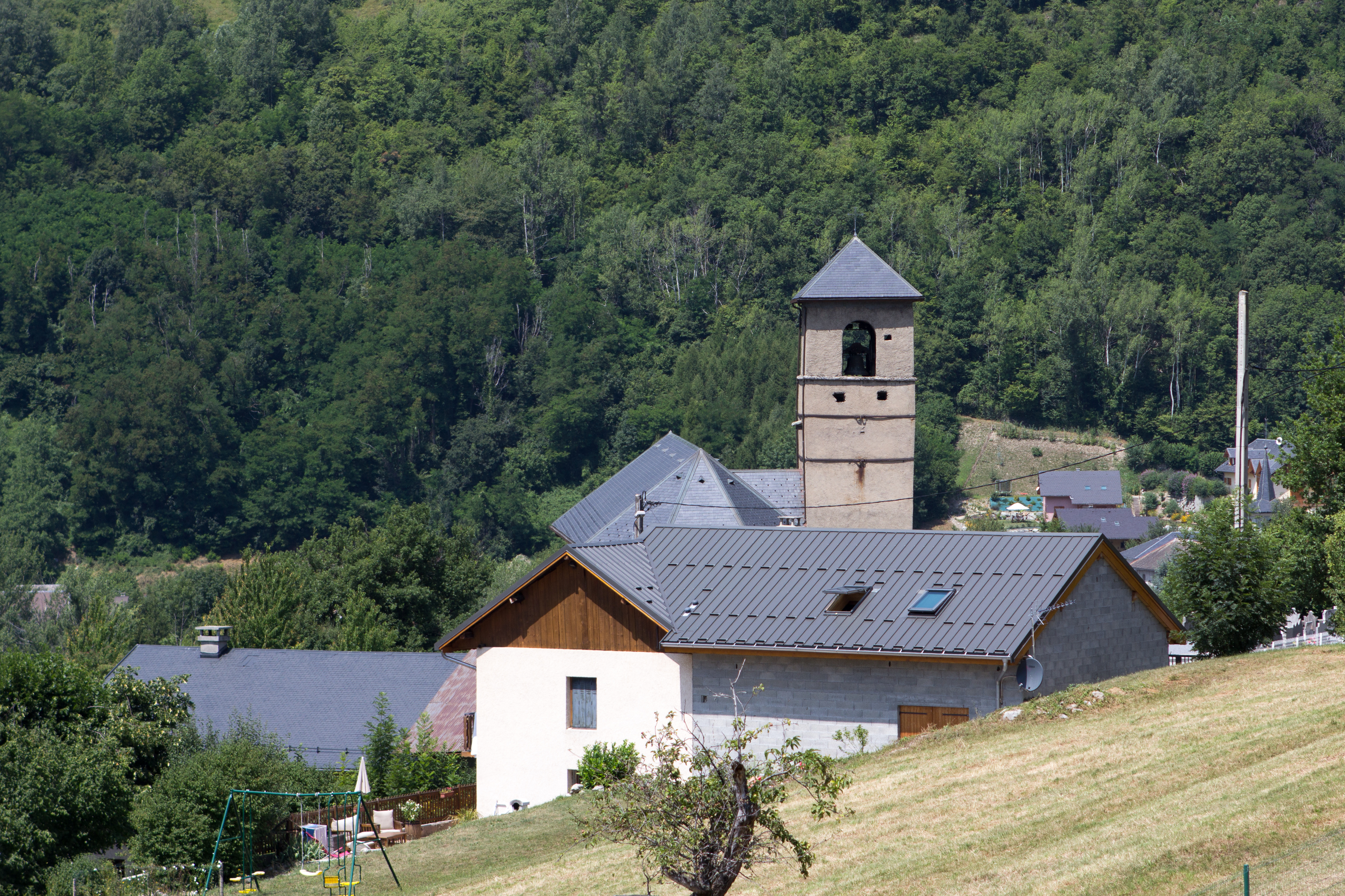 Église de Saint-Martin-sur-la-Chambre / Saint-Martin-sur-la-Chambre / Savoie / France